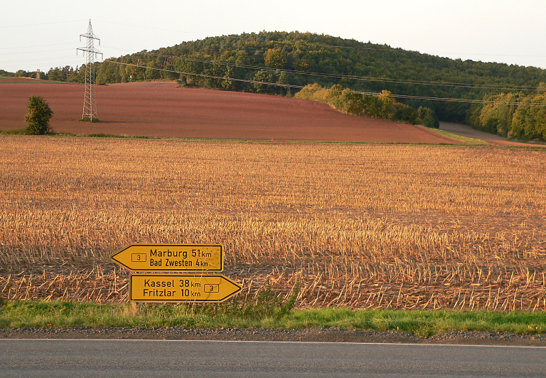 Schwalmpforte: Roter Ackerboden bei Kerstenhausen (Borken) Blick von der Einmündung der Kreisstraße 73 (Kerstenhausener Straße) in die Bundesstraße 3 nach Norden zum Hasenberg (321,7 m)